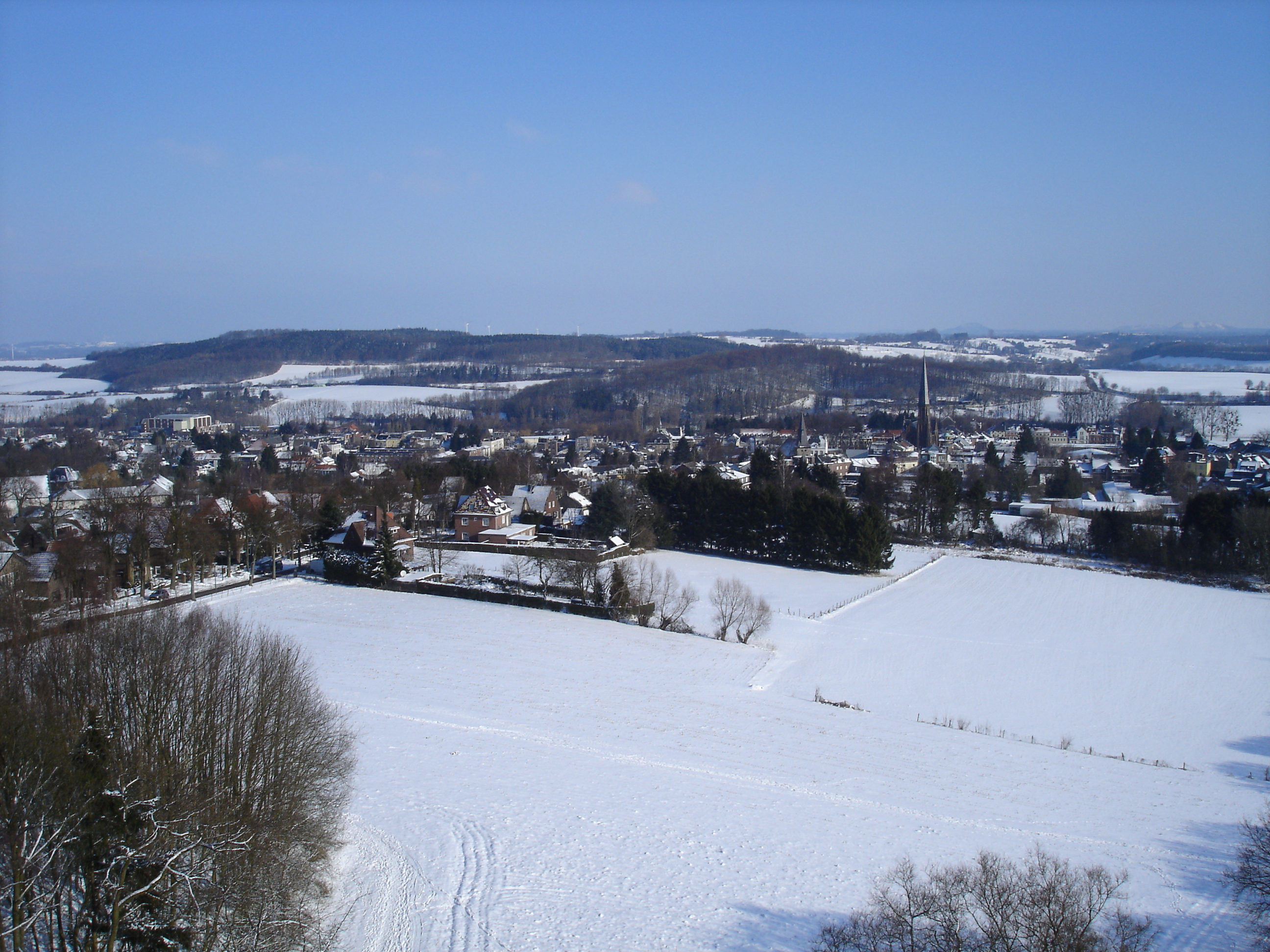 uitzicht over Vaals, zelf genomen foto View of Vaals, the Netherlands